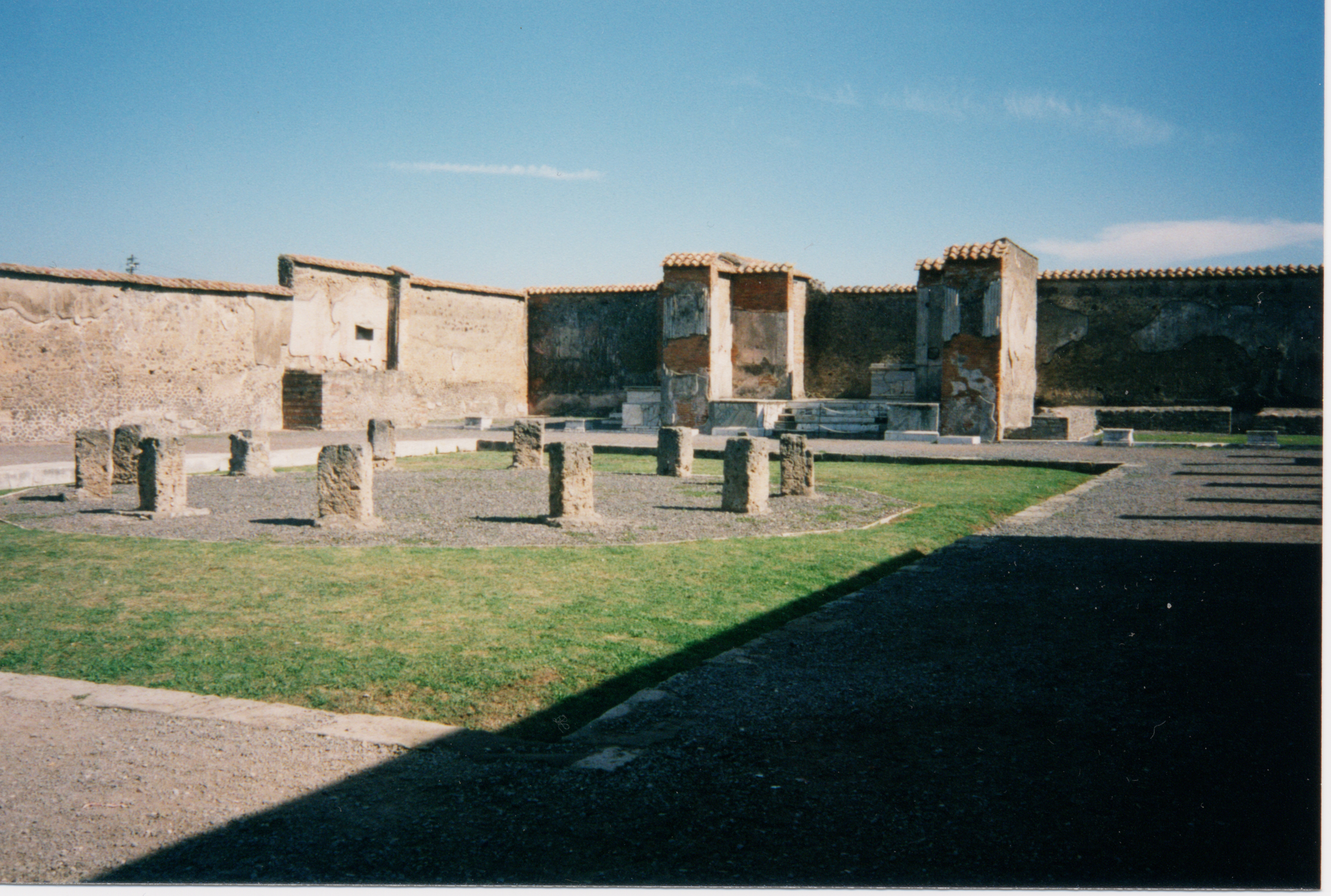 Macellum in Pompeii, Italia